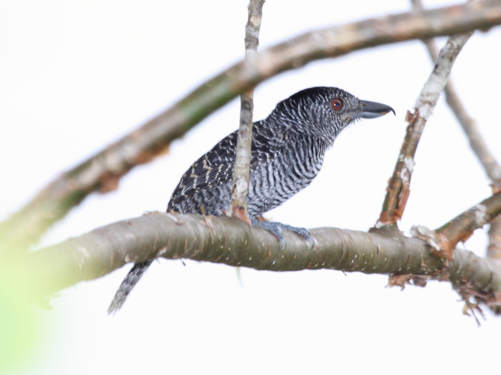 Fasciated Antshrike (Cymbilaimus lineatus), male. Taken in Panama.